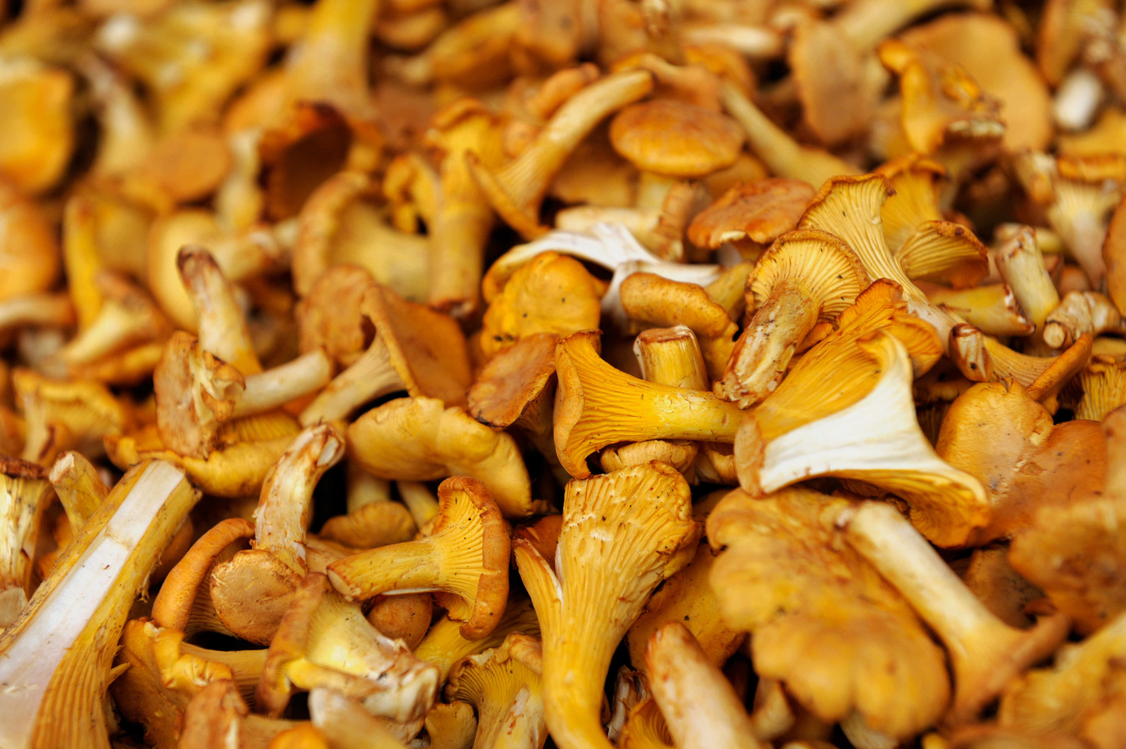 kantareller